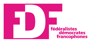 Logo FDF